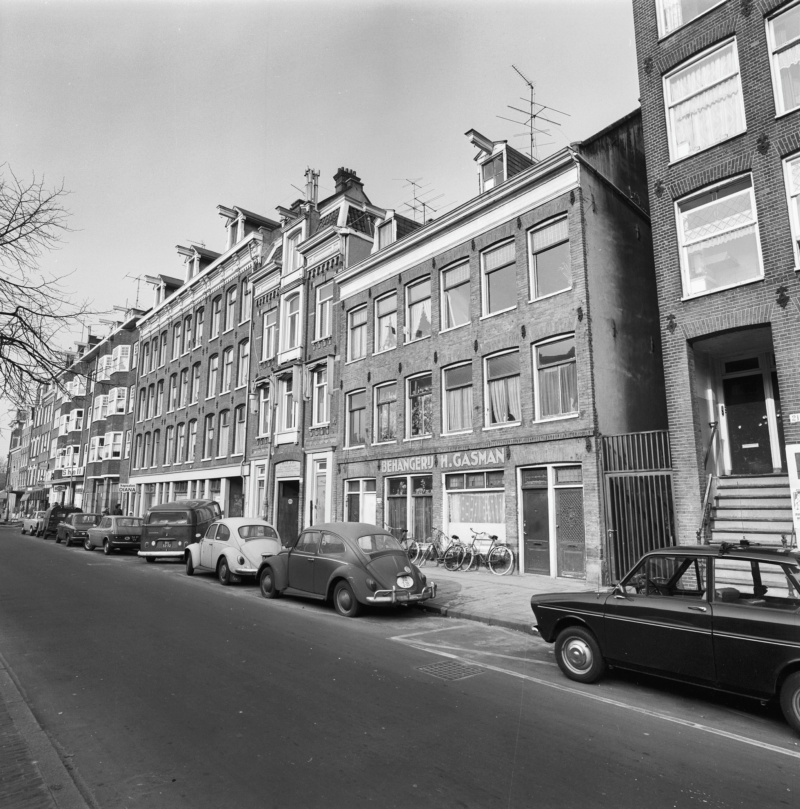 voorgevels